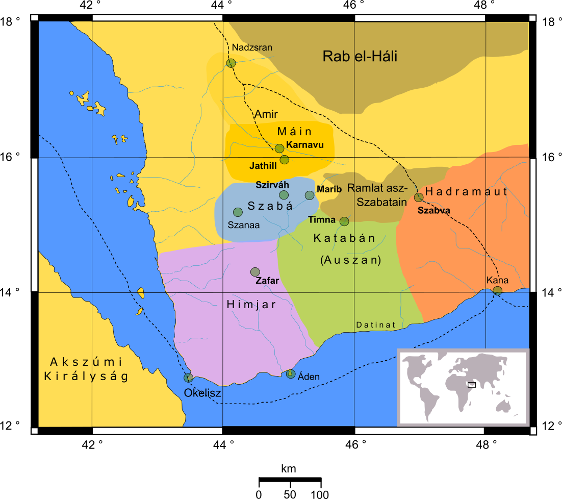 Jemen régen.